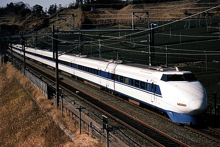 shinkansen series 100 (original style) 100系新幹線電車(掛川-静岡間にて)